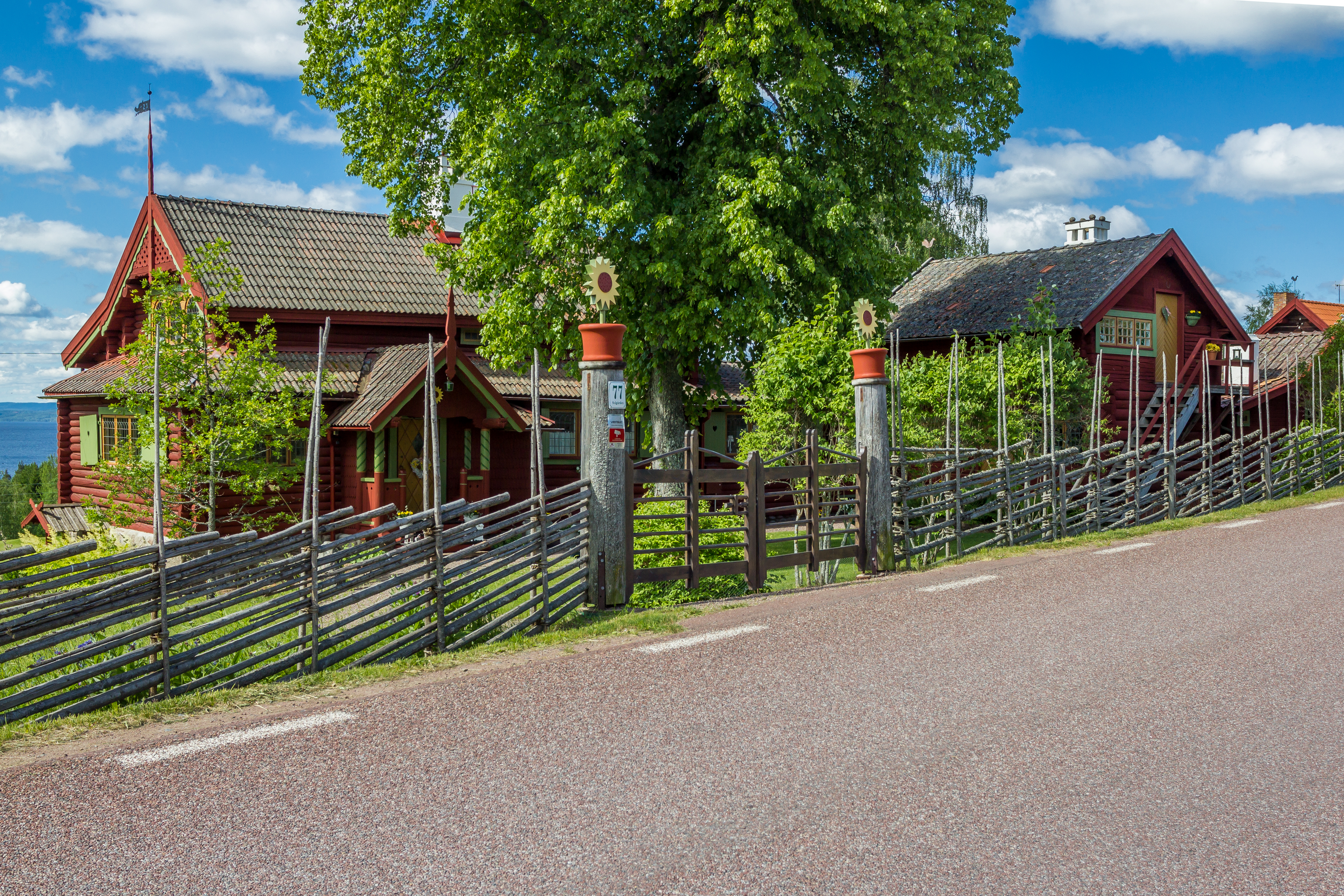 Solgården i Sjurberg, Rättviks kommun, Sverige.